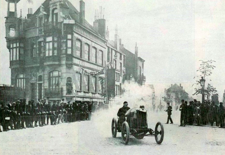 Giosuè Giuppone vainqueur de la Coupe des voiturettes à Ostende en 1909 - La Vie au Grand Air du25 septembre 1909, p.230